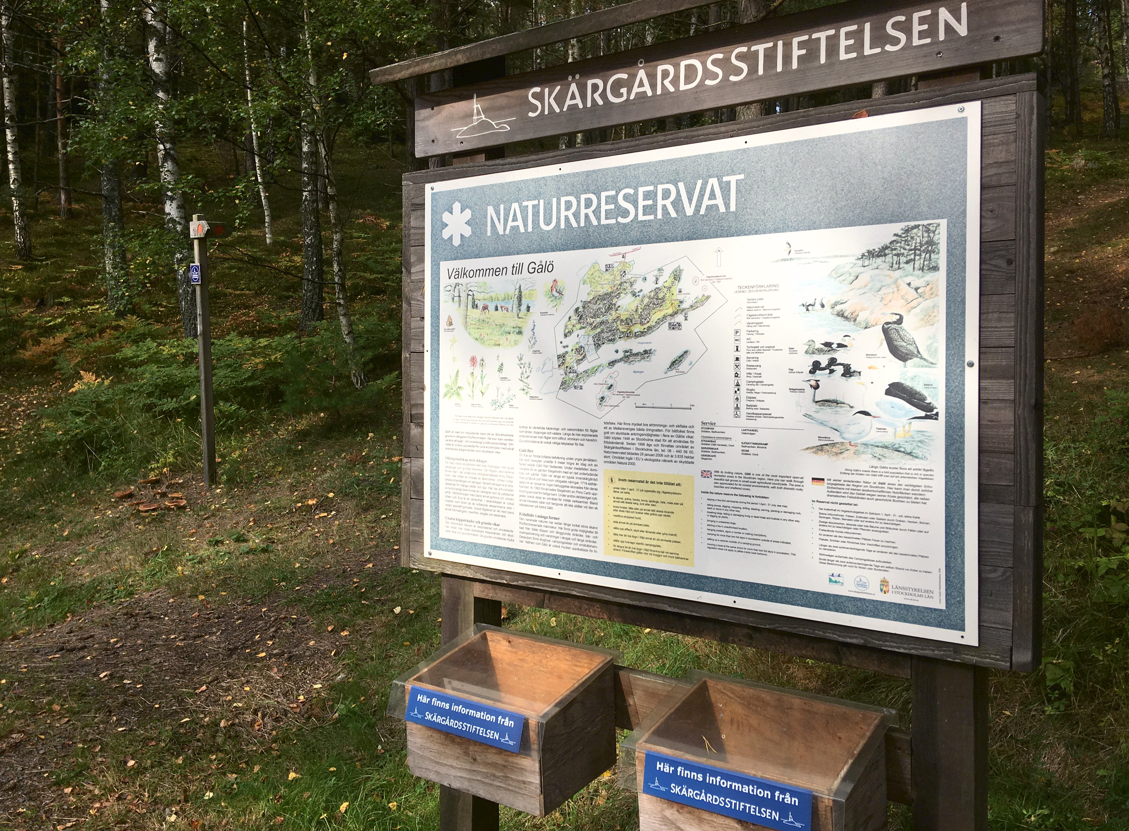 Gålö naturreservat, skylt vid Fornstigen